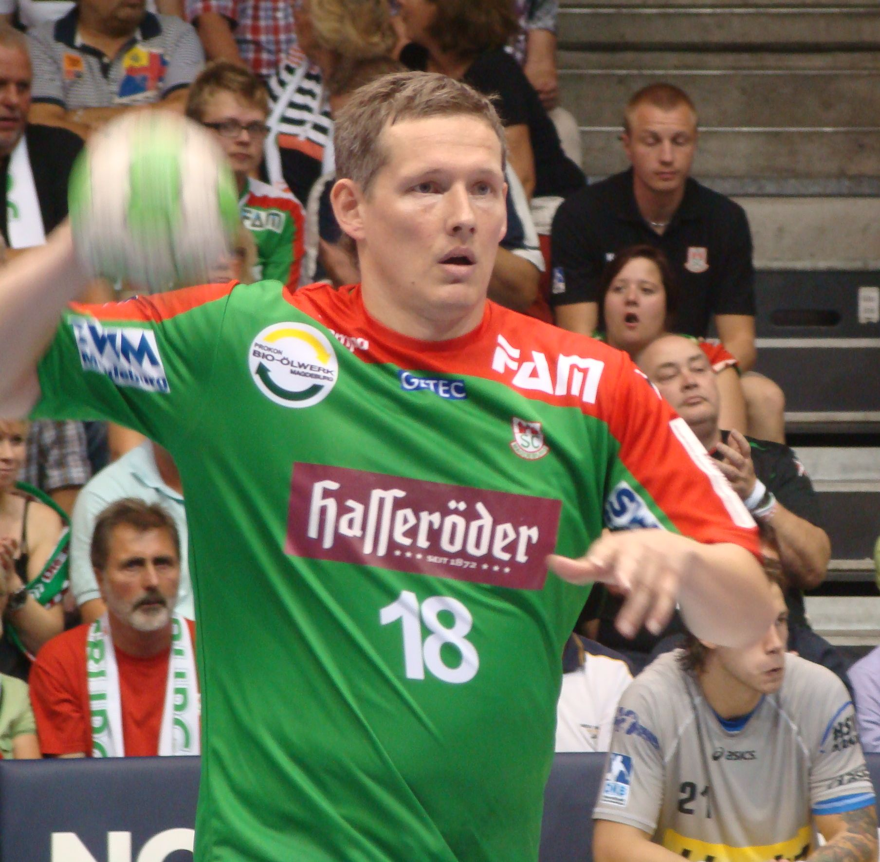 Stian Tønnesen im Spiel des SC Magdeburg gegen den HSV in der GETEC-Arena Magdeburg.